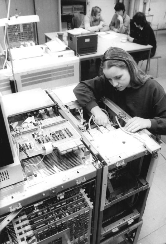 VEB Robotron Elektronik Dresden, Computer EC 2655M ADN-ZB Häßler 11.2.85 Dresden: Der VEB Robotron Elektronik Dresden produziert seit rund 15 Jahren elektronische Datenverarbeitungsgeräte. Rechner vom Typ R 21, EC 2640 und EC 2156 bewähren sich im In- und Ausland. Hauptabnehmer von Erzeugnissen des Elektronik-Großbetriebes ist die Sowjetunion. Im ersten Monat dieses Jahres wurden acht Rechner des Typs EC 2655 in die Sowjetunion expordiert. Prüffeldingenieur Claudia Uhlemann beim Test einer Baugruppe für die Rechner EC 2655 M.